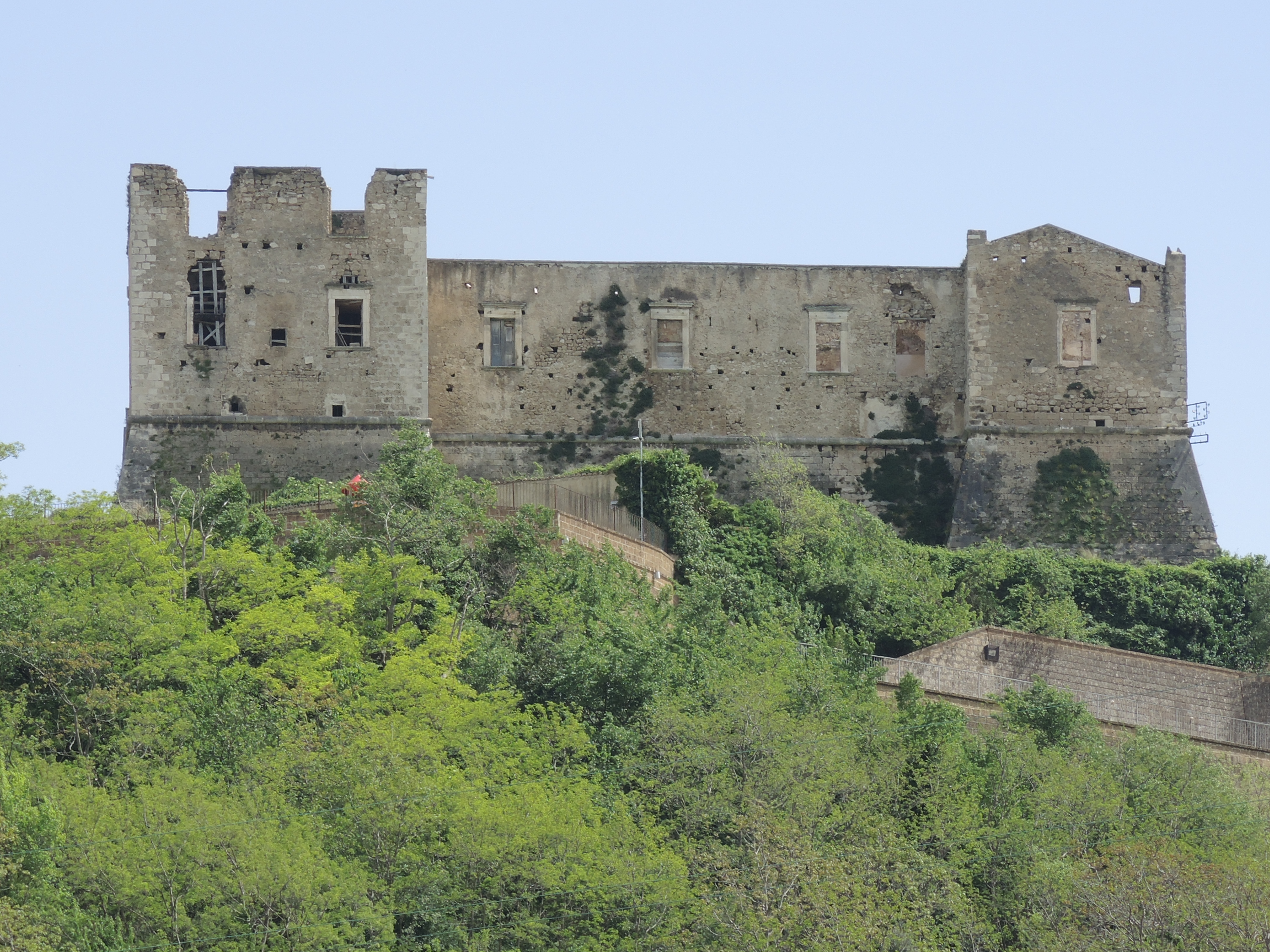 Tocco da Casauria: Castello Caracciolo